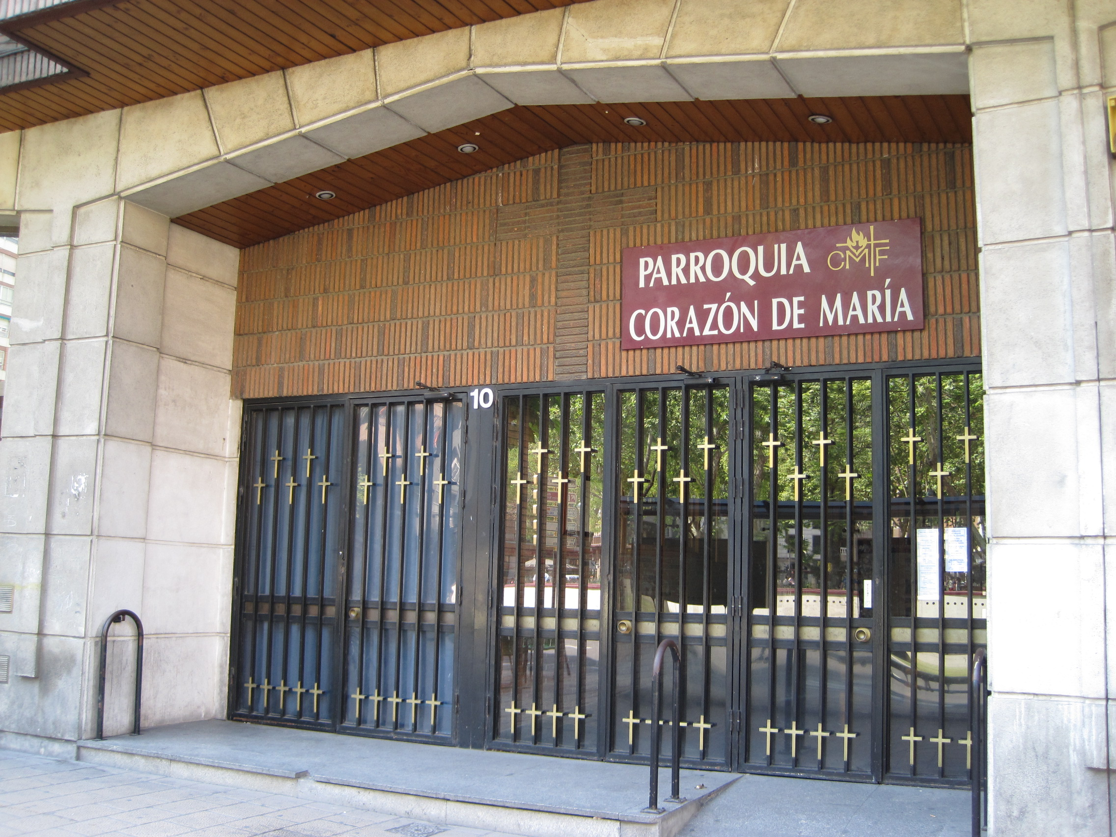 Entrada de la parroquia Inmaculado Corazón de María, en La Circular (Valladolid, España).